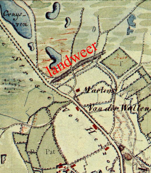 Detail van Tranchot-kaart circa 1804 met daarop de Liesselse landweer tussen de Heitrak en de Soeloop. De rode aanduiding staat niet op de orginele kaart